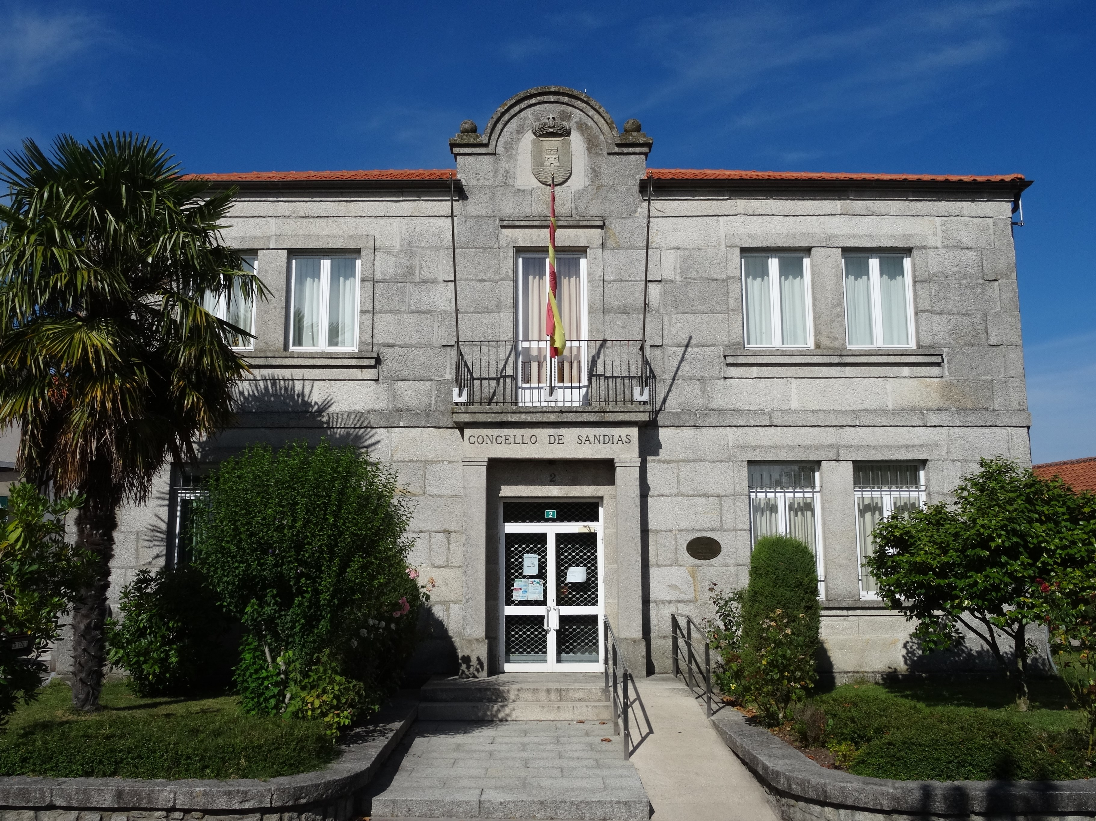 Casa do concello de Sandiás, Ourense.